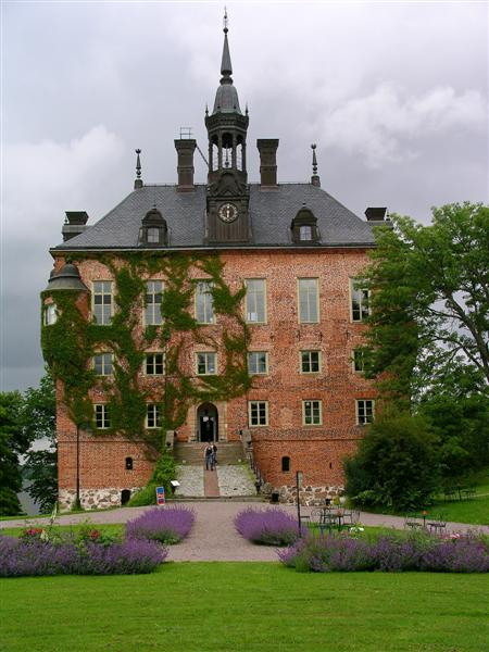 Foto: Tor Svensson